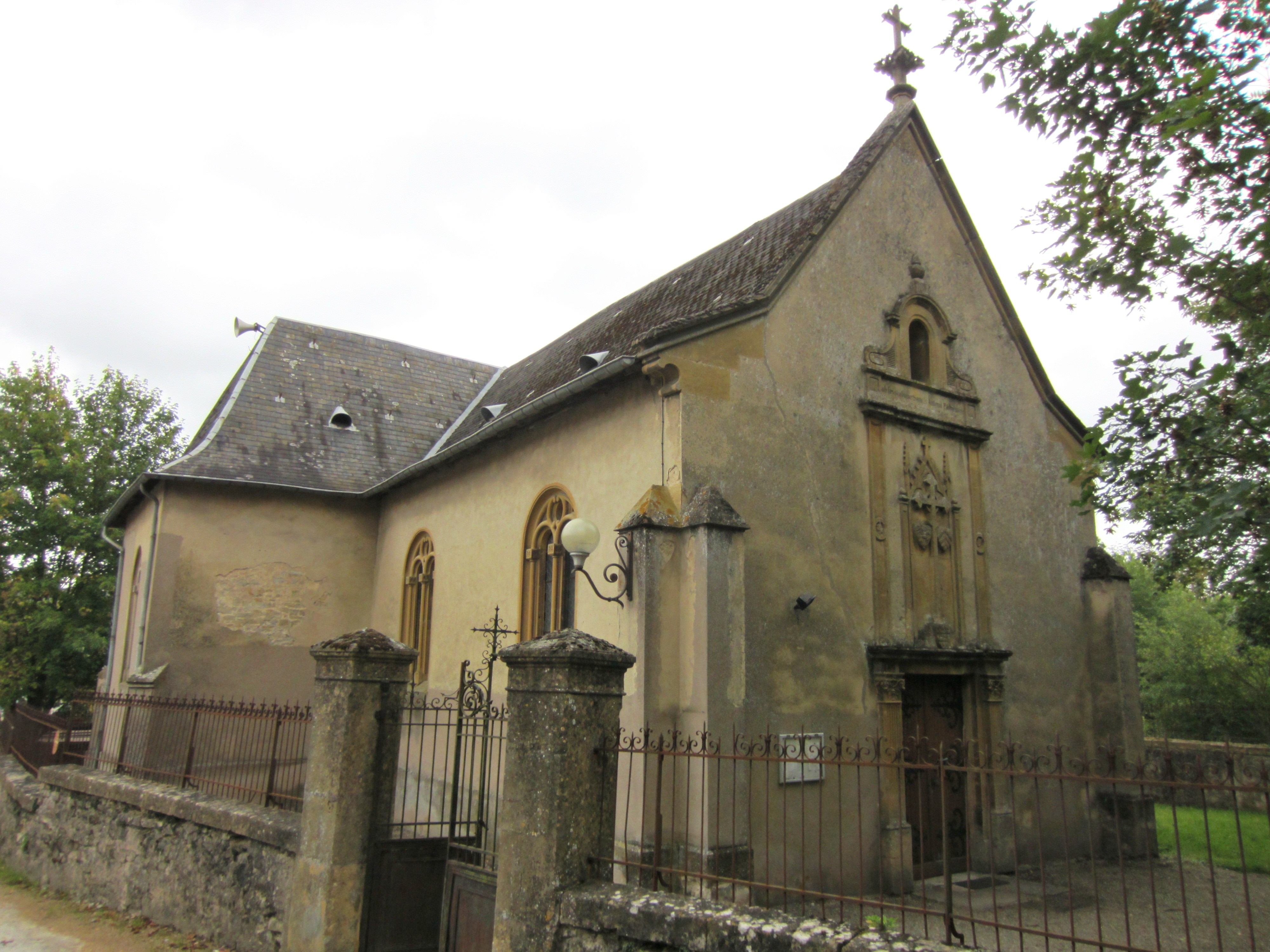 Description Chapelle castrale Saint-Antoine de Padoue Hombourg Budange Chapelle castrale Saint-Antoine de Padoue Hombourg Budange